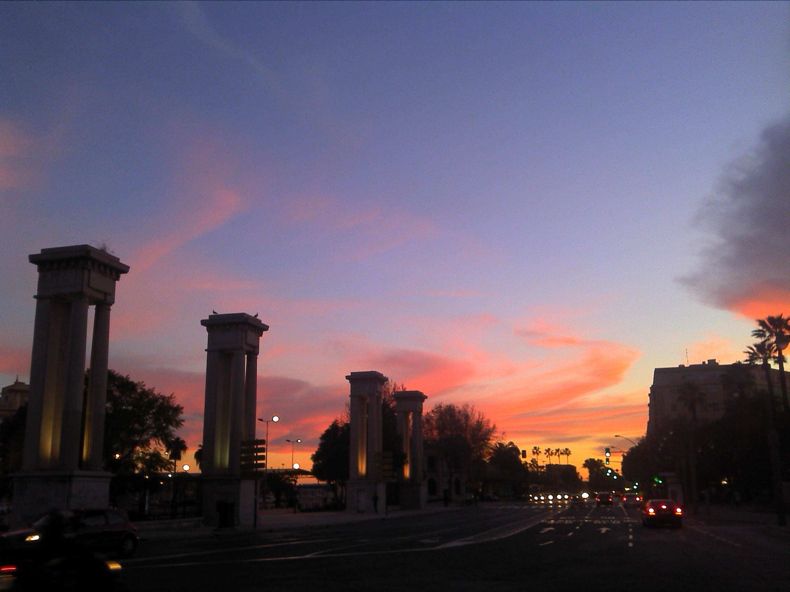 Málaga, España.